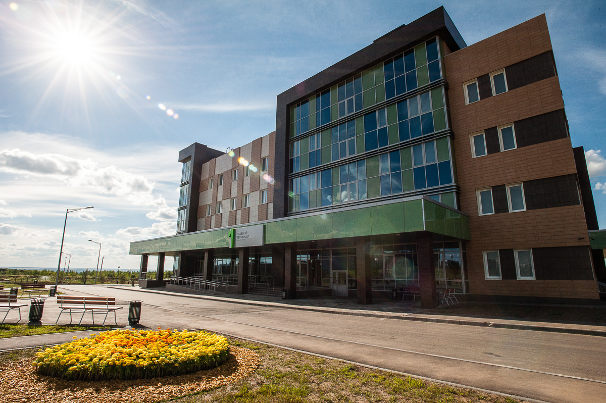 Медицинский центр в Иннополисе